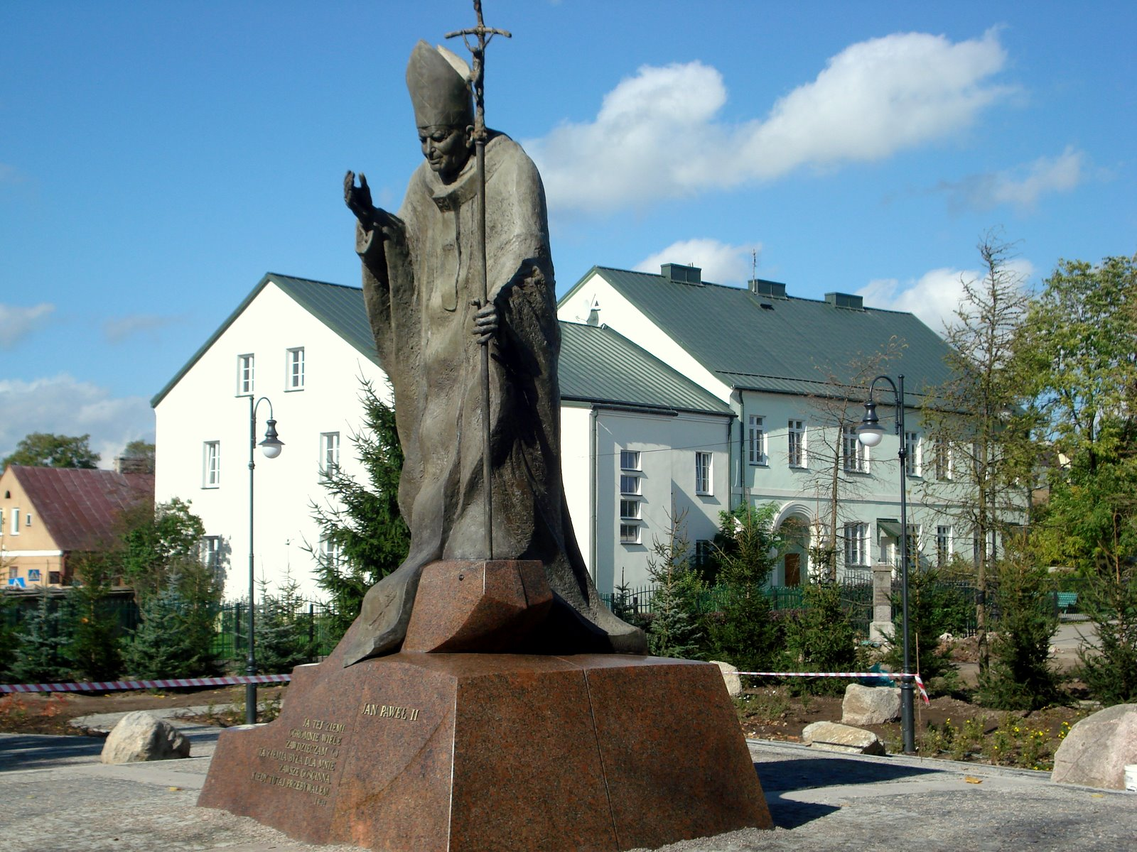 Pomnik Jana Pawła II w Suwałkach